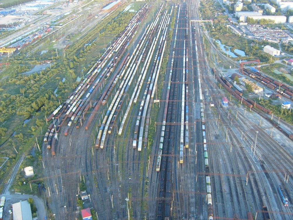 ст. Войновка, г. Тюмень